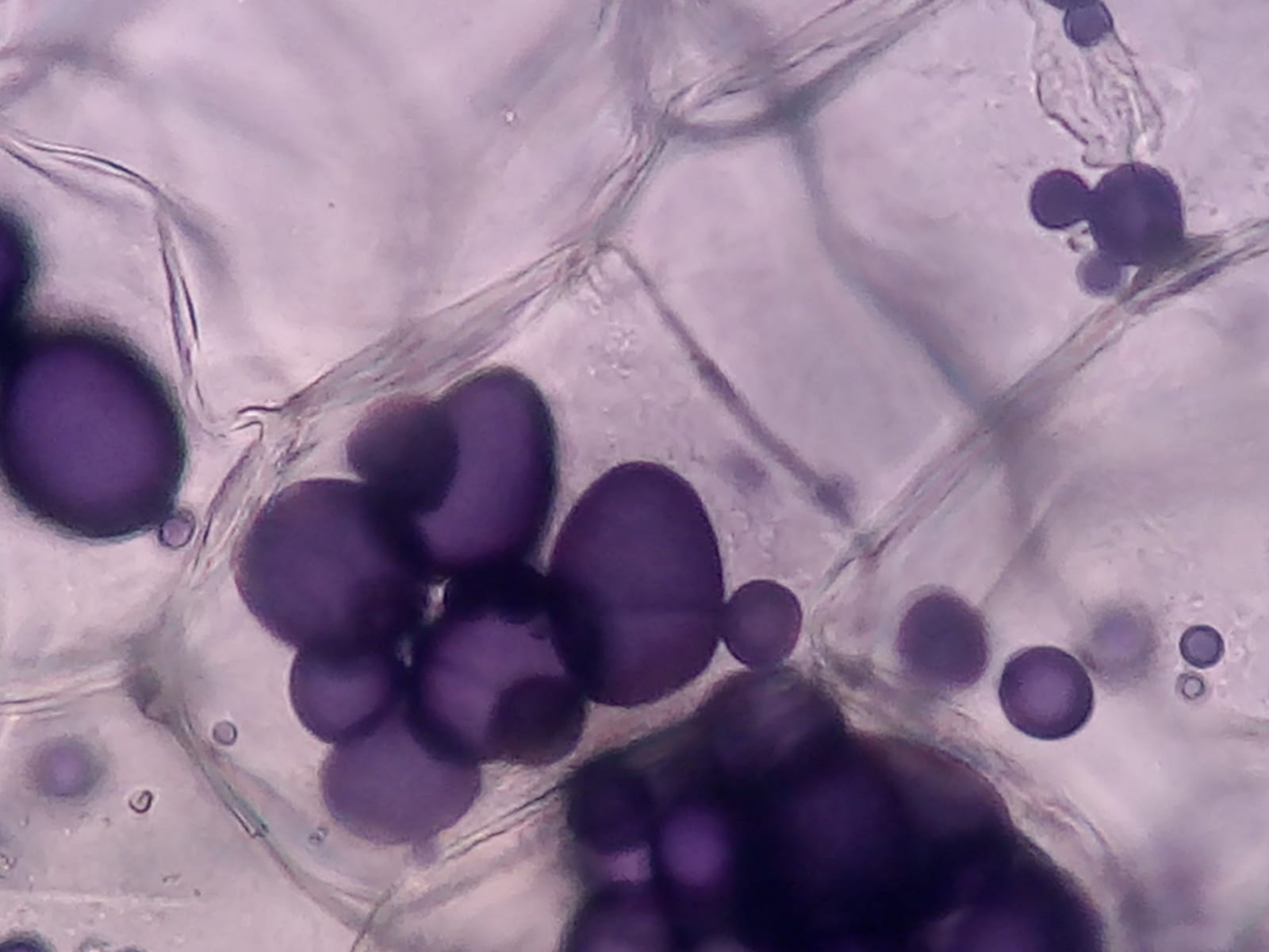 Granos de almidón en una célula de papa. Microscopía óptica, teñido con lugol (dilución 25%). Aumento: 400X